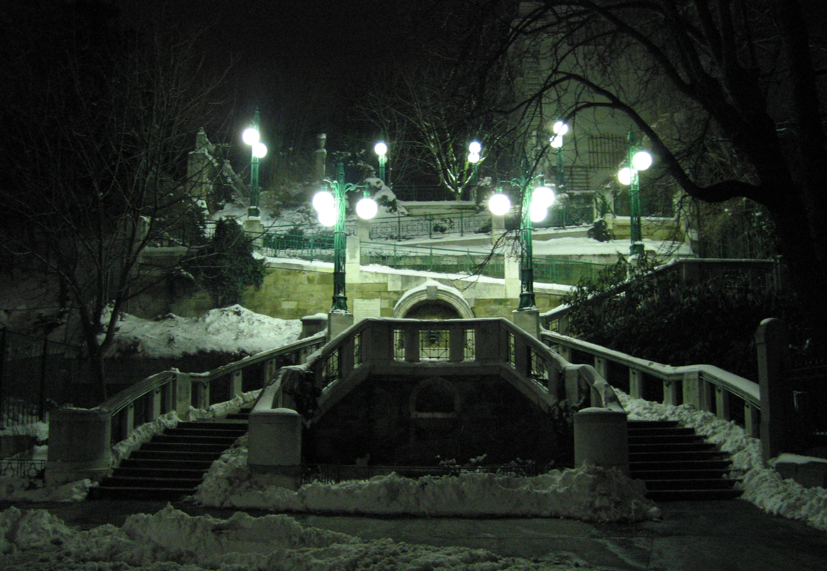 Strudlhofstiege at night, 1090 Vienna, Austria